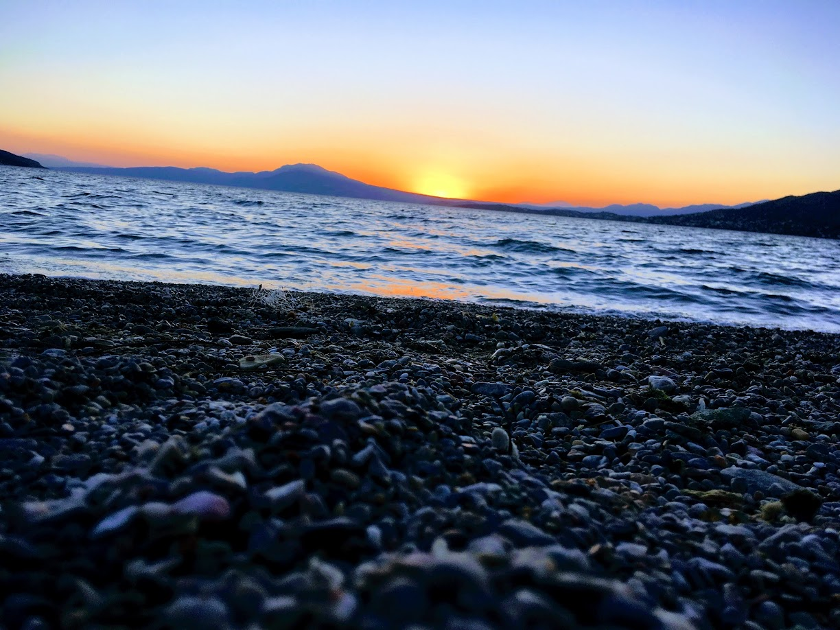 Παραλία Σαλαμίνας Αιάντειο. Ηλιοβασίλεμα.